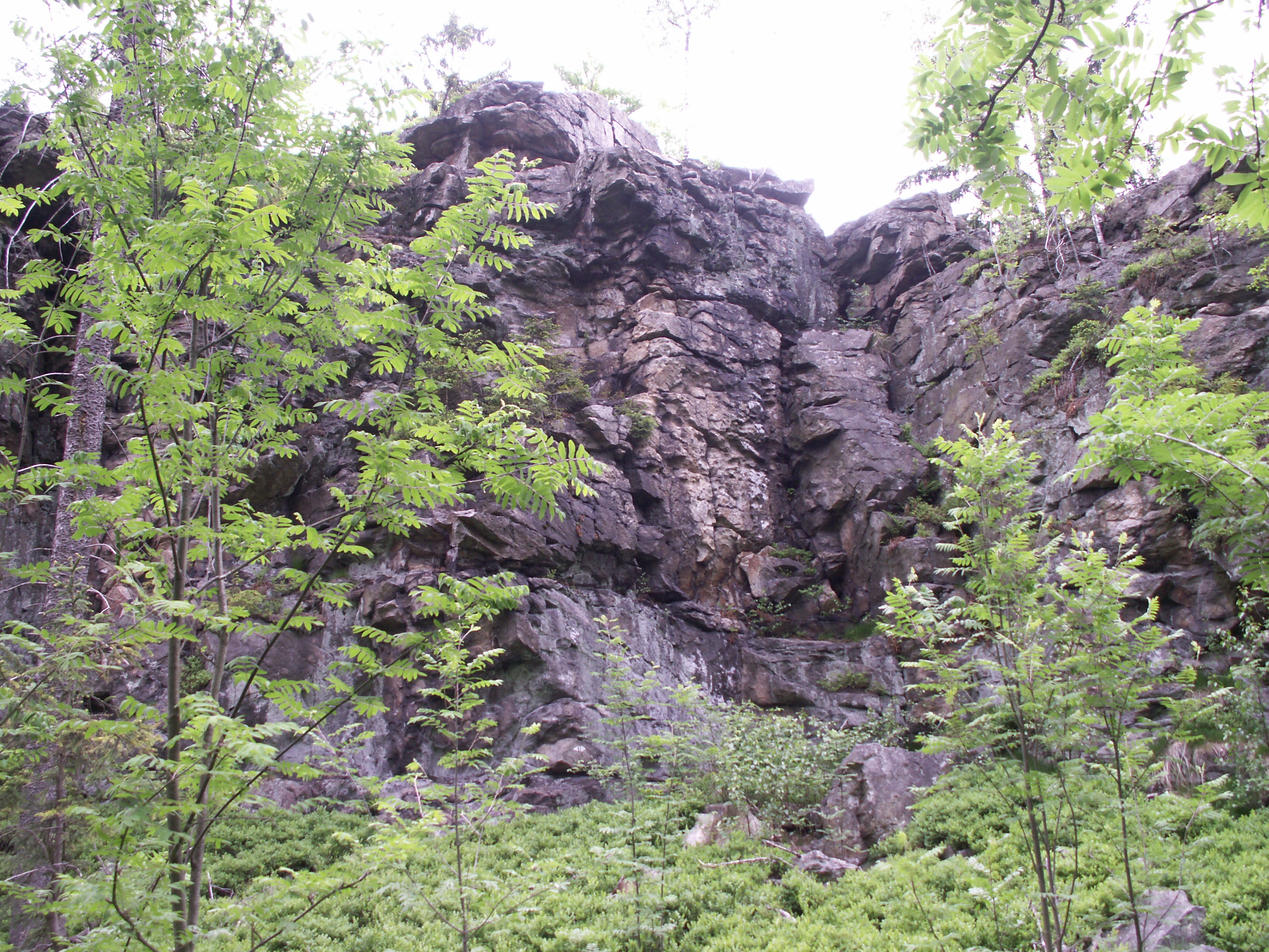 přírodní rezervace Tisůvka, rulová skála, kóta 800 m n.m., okres Žďár nad Sázavou, kraj Vysočina